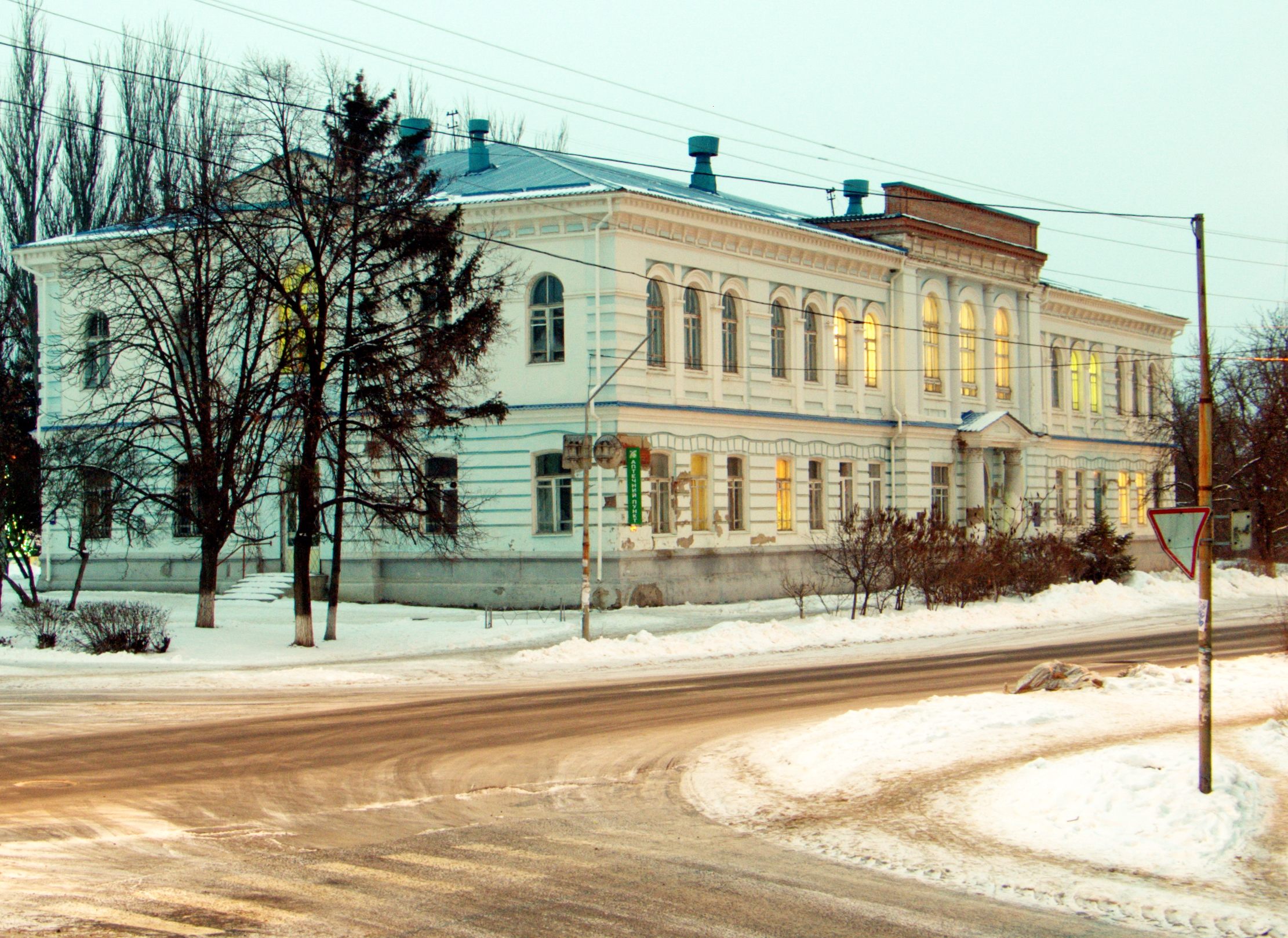 Гімназія (сучасне використання — медична установа), Ізюм, вулиця Покровська (Фрунзе), 34